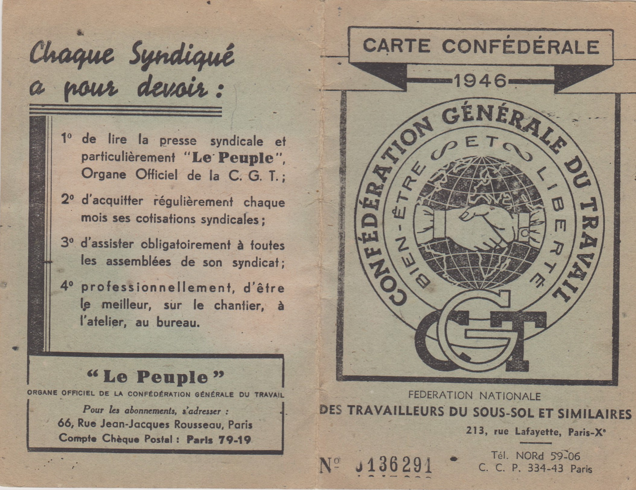 Carte d'adhérent à la "Fédération des mineurs" CGT (France), année 1946 (recto). Au verso figurent le nom du syndiqué, son syndicat local et les timbres mensuels de cotisation.